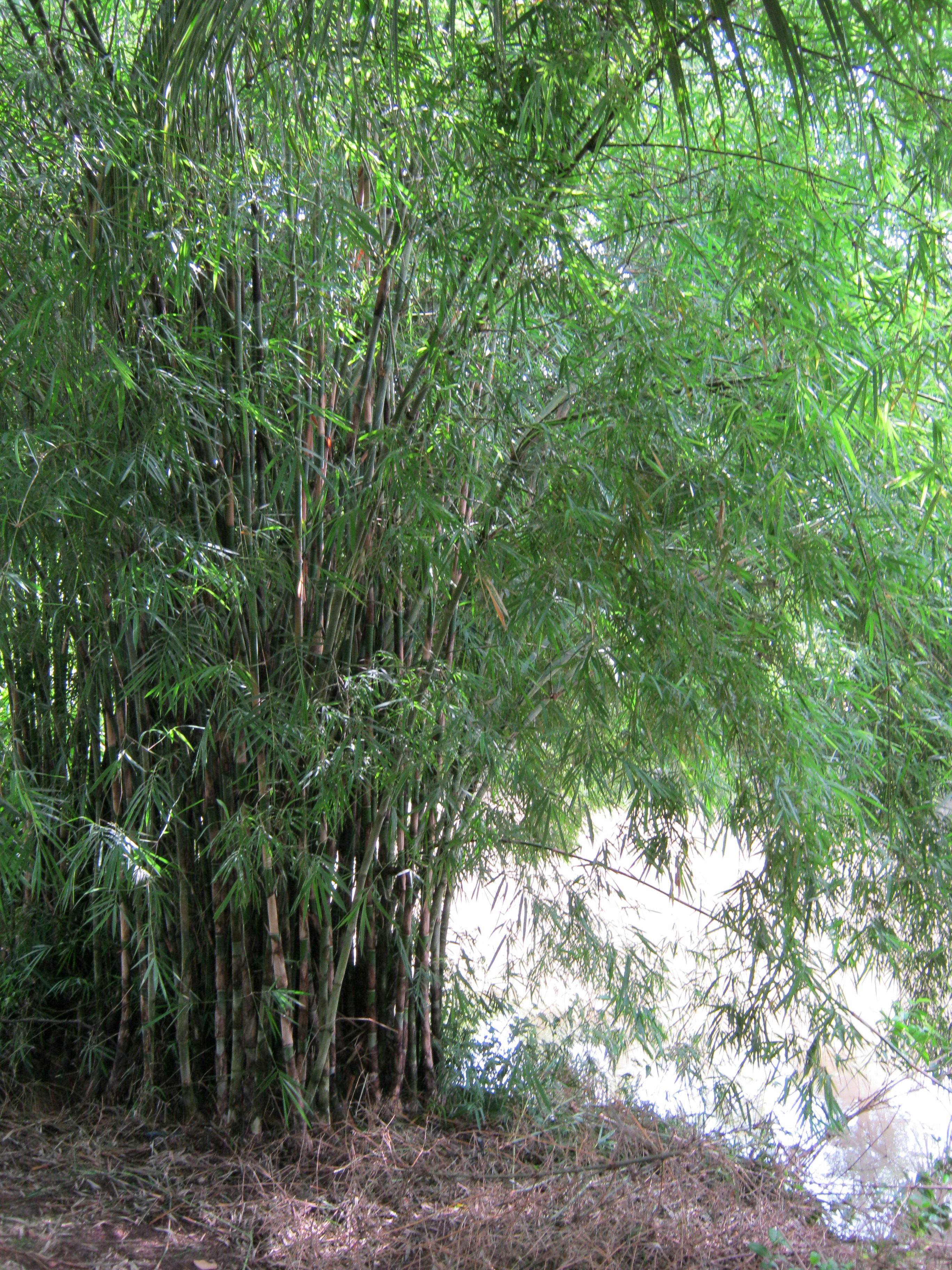 Một bụi trúc trong một làng quê ở An Giang, Việt Nam.